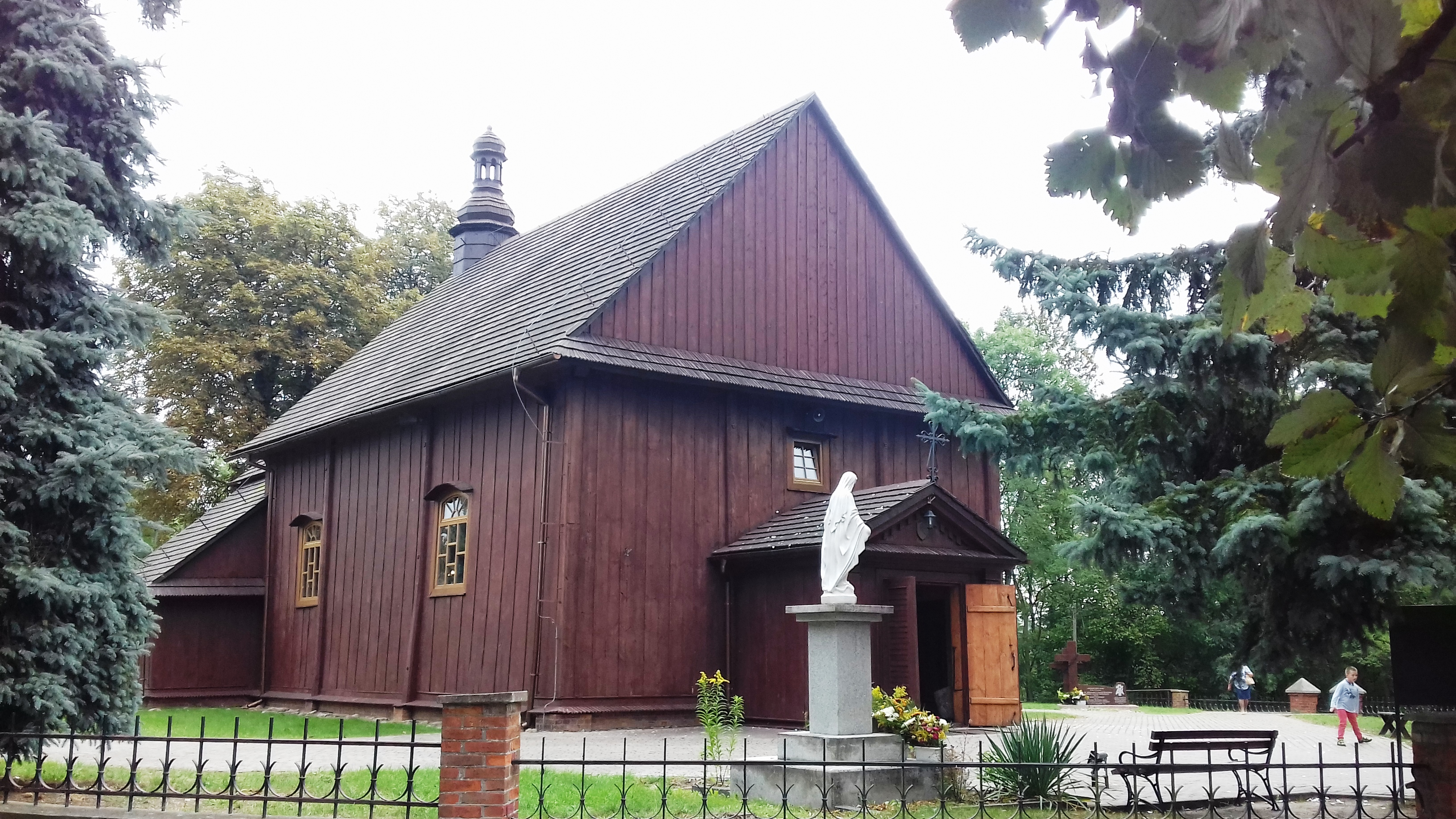 Słupno (gm. Słupno, pow. Płock) - kościół Św. Marcina